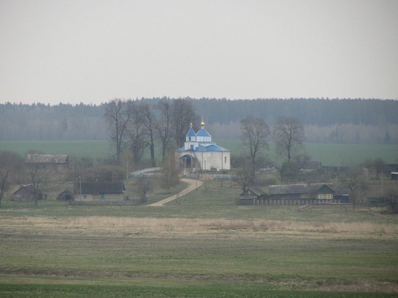 Цапра. Царква